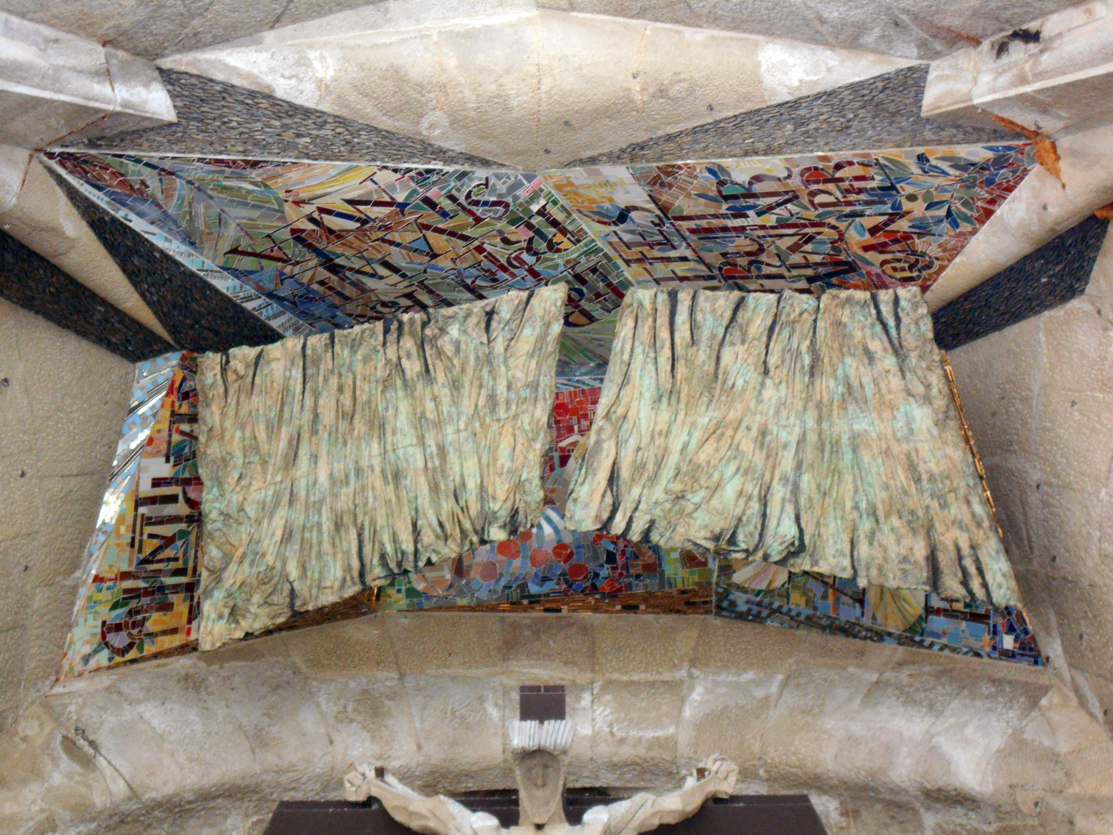 Velo rasgado, fachada de la Pasión.